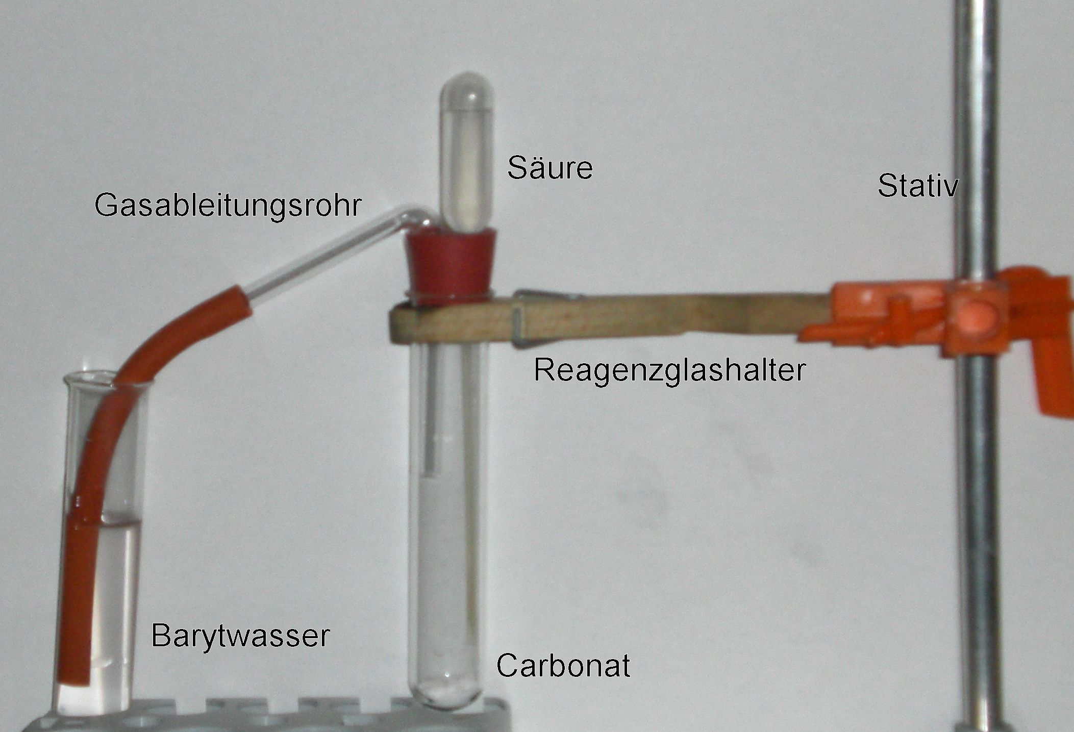 Nachweis von Carbonaten mittels indirekten Nachweises